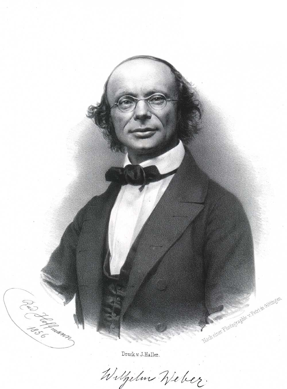 Wilhelm Eduard Weber (1804-1891)